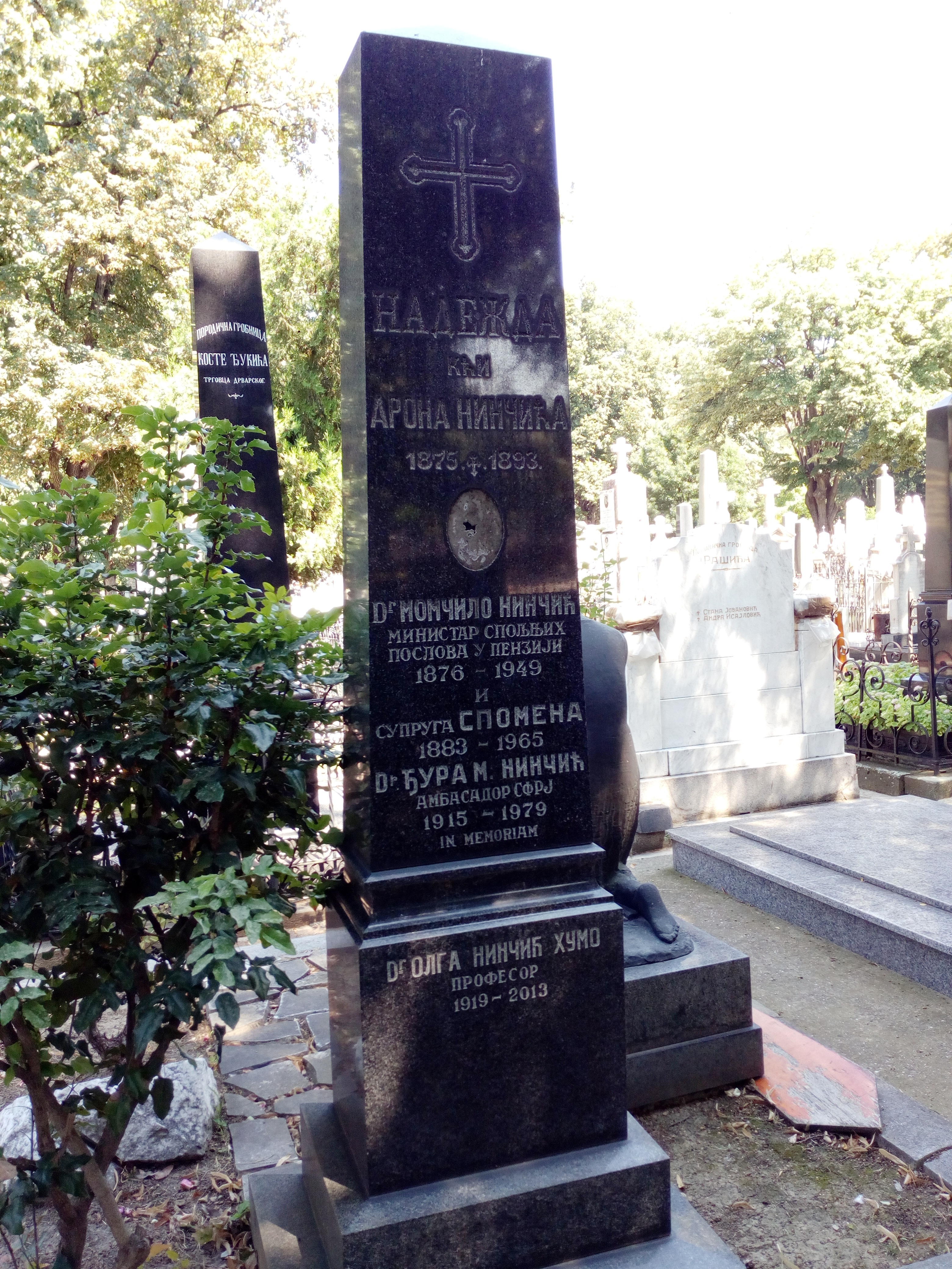 Гробница породице Нинчић на Новом гробљу у Београду